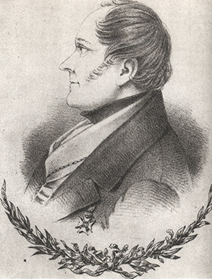 Per Adam Wallmark (1777-1858)